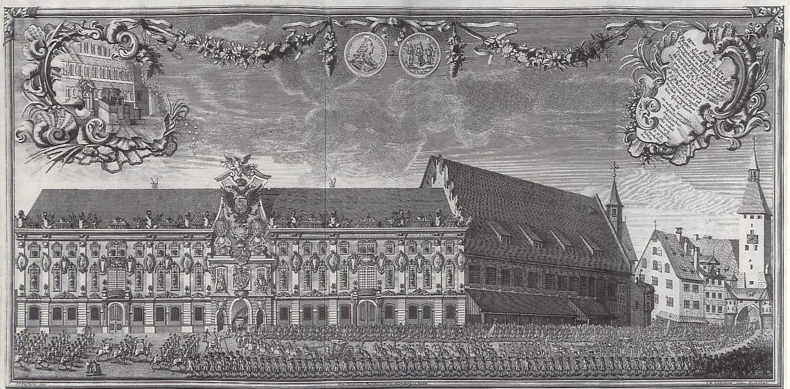 Deutschordenskommende Nürnberg. Kupferstich und Radierung 1746, Ansicht von Süden, Einzug des Grafen von Sazenhofen in Nürnberg